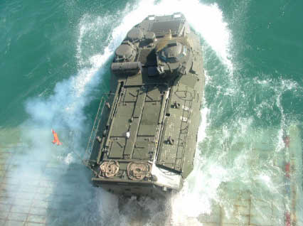 AAV7 dell'Esercito Italiano in navigazione